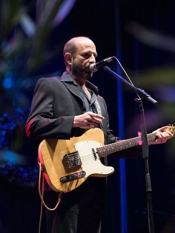 La música tomó las calles en la primera noche de San Isidro 2017, dejando espacio a raíces, tradición y vanguardia venidas de distintos lugares físicos y emocionales.